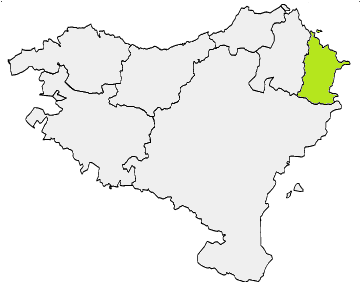 Situación de Sola dentro de Vasconia.